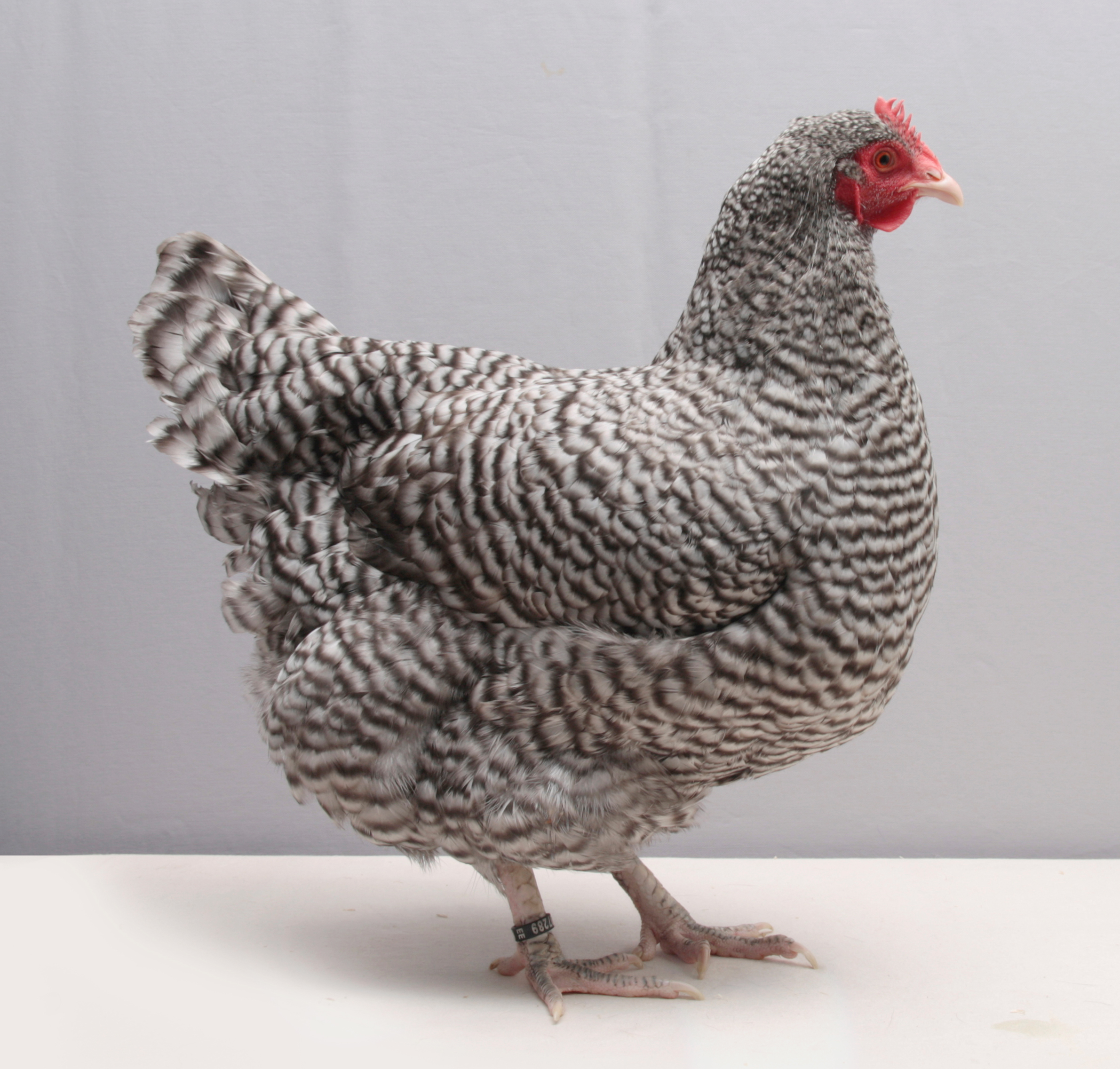 Noordhollands hoen, hen